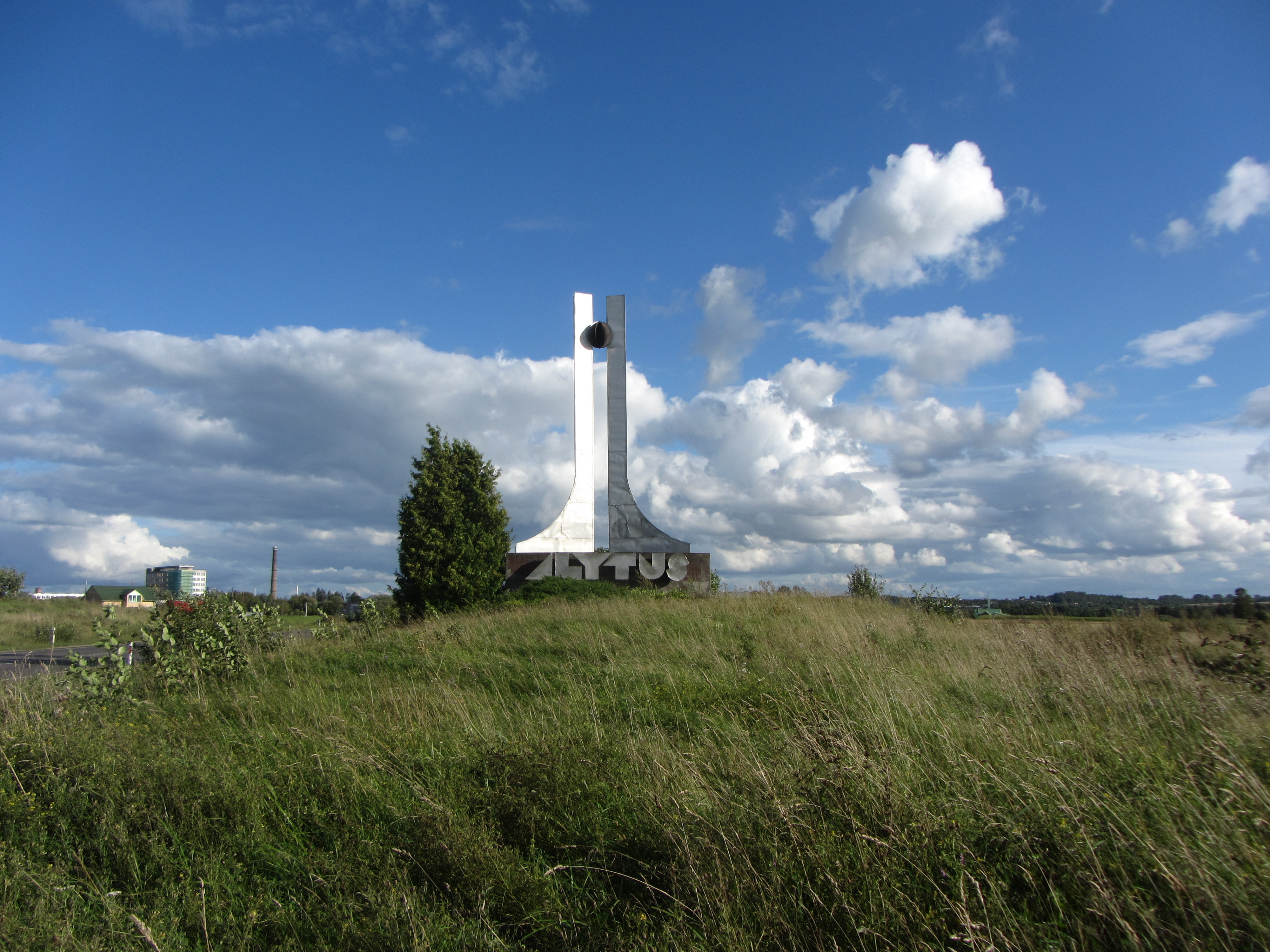 Miklusėnai, Lithuania